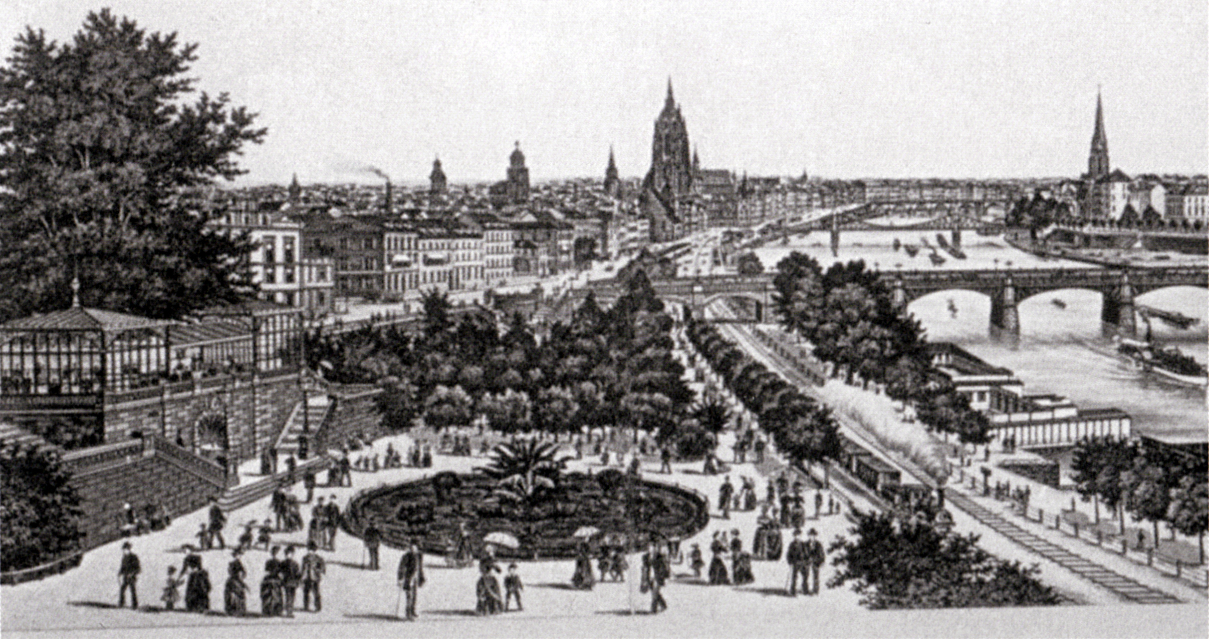 Das Frankfurtter Nizza um 1900